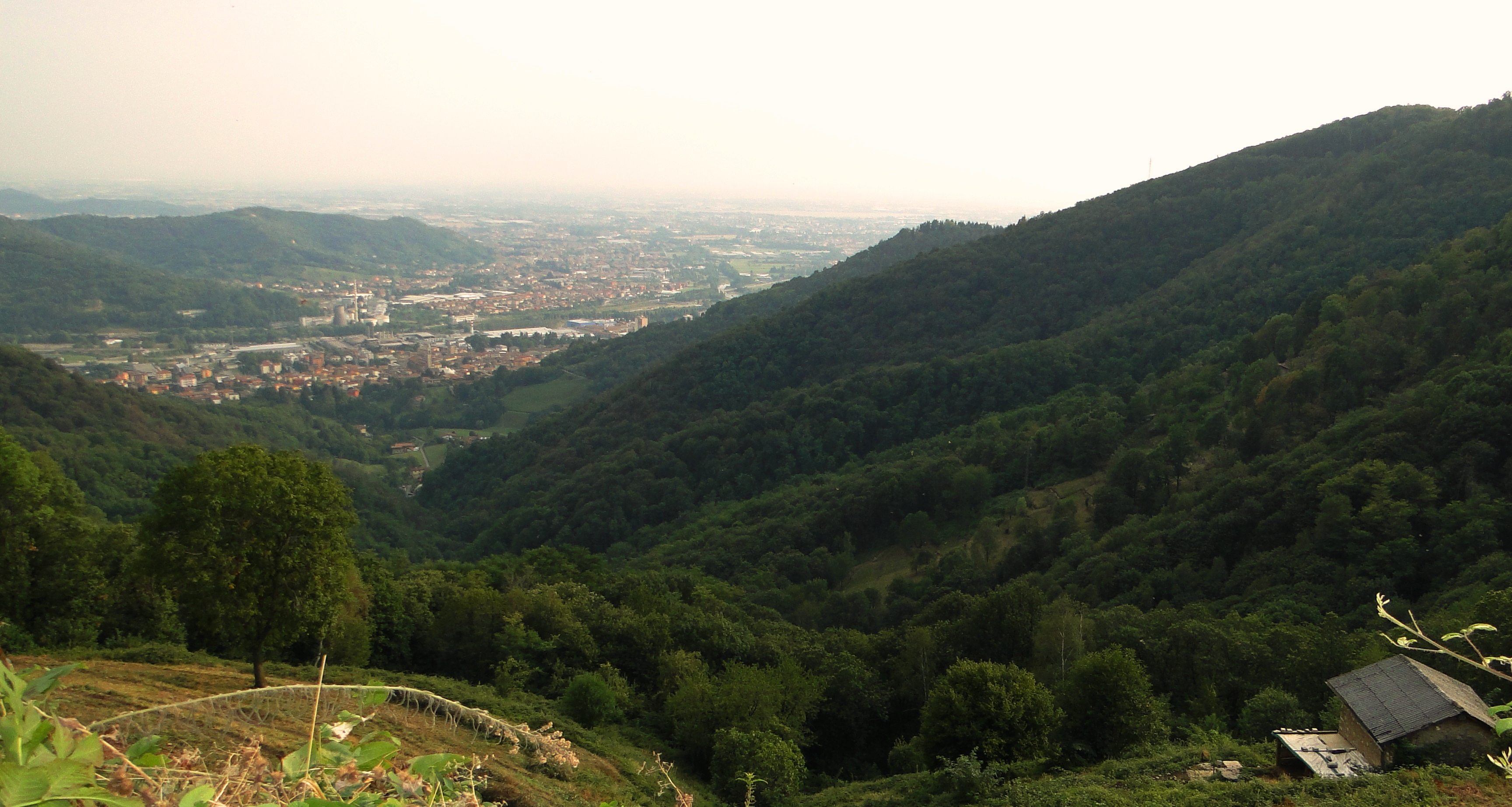 Vista da Lonno (Nembro) sulla val Luio, Alzano e la pianura bergamasca